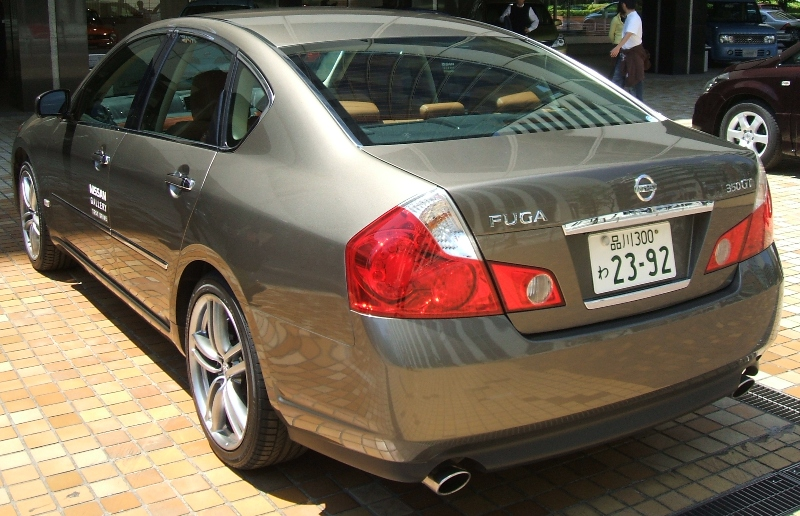 Nissan Fuga 350GT.